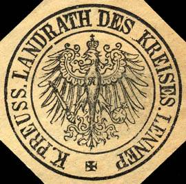 Sealing stamp Title: Königlich Preussischer Landrath des Kreises Lennep Description: grau, schwarz Place: size: 3 cm